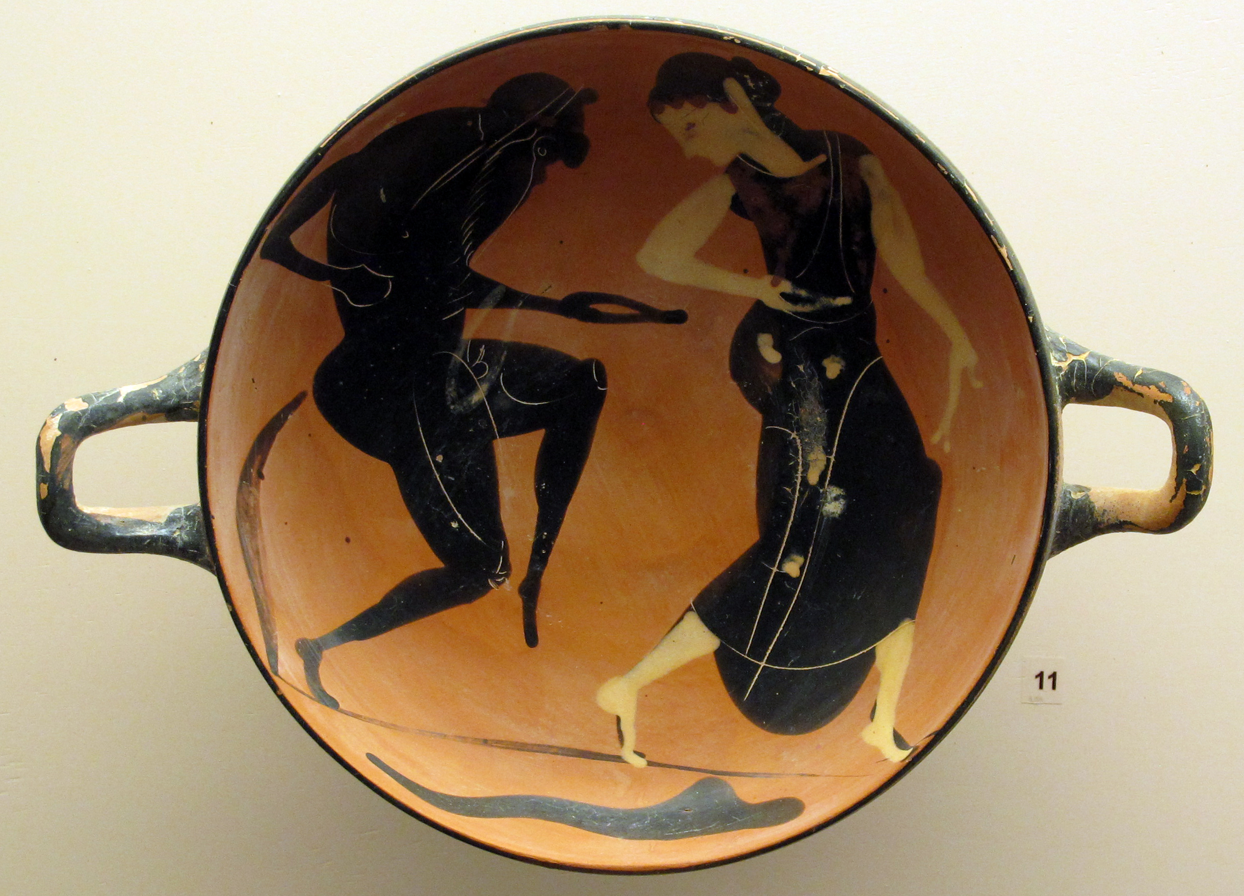 Coppa a figure nere con satiro e menade danzanti, da tomba a Macri langoni T109 (32), 500 ac ca.